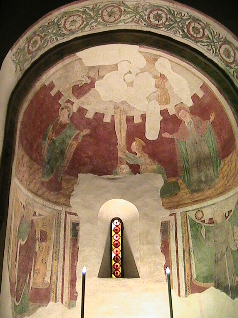 Pieve di Santa Maria Assunta - affreschi